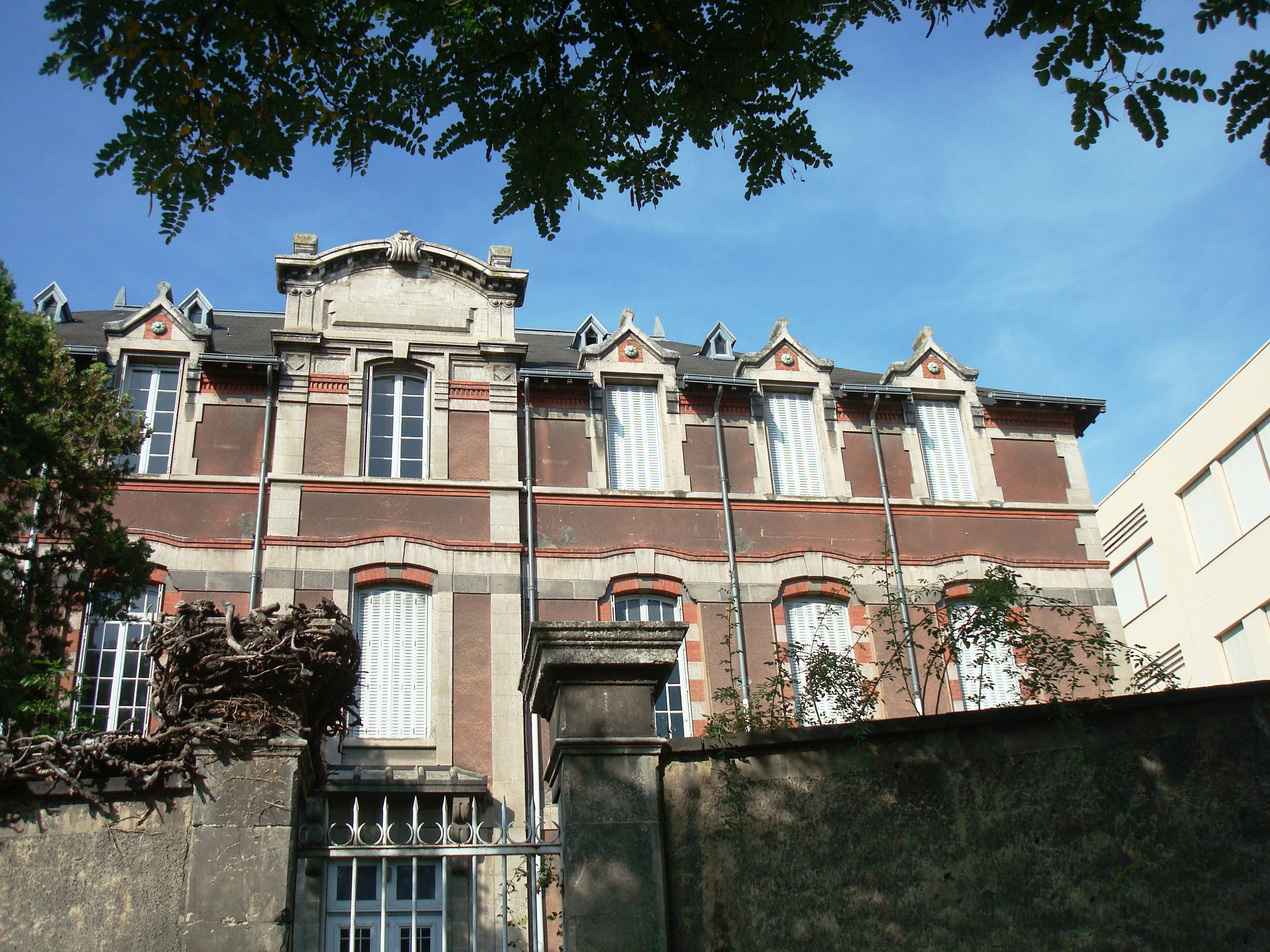 Ecole de Sages-Femmes, Hôtel Dieu, Clermont-Ferrand .